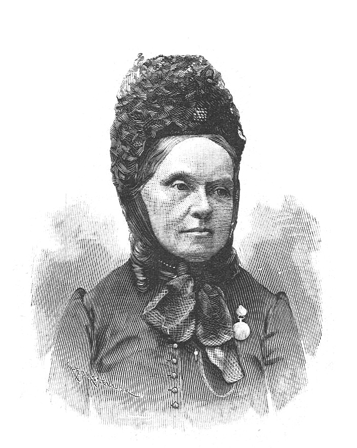 Sophie Adlersparre (1823-1895)